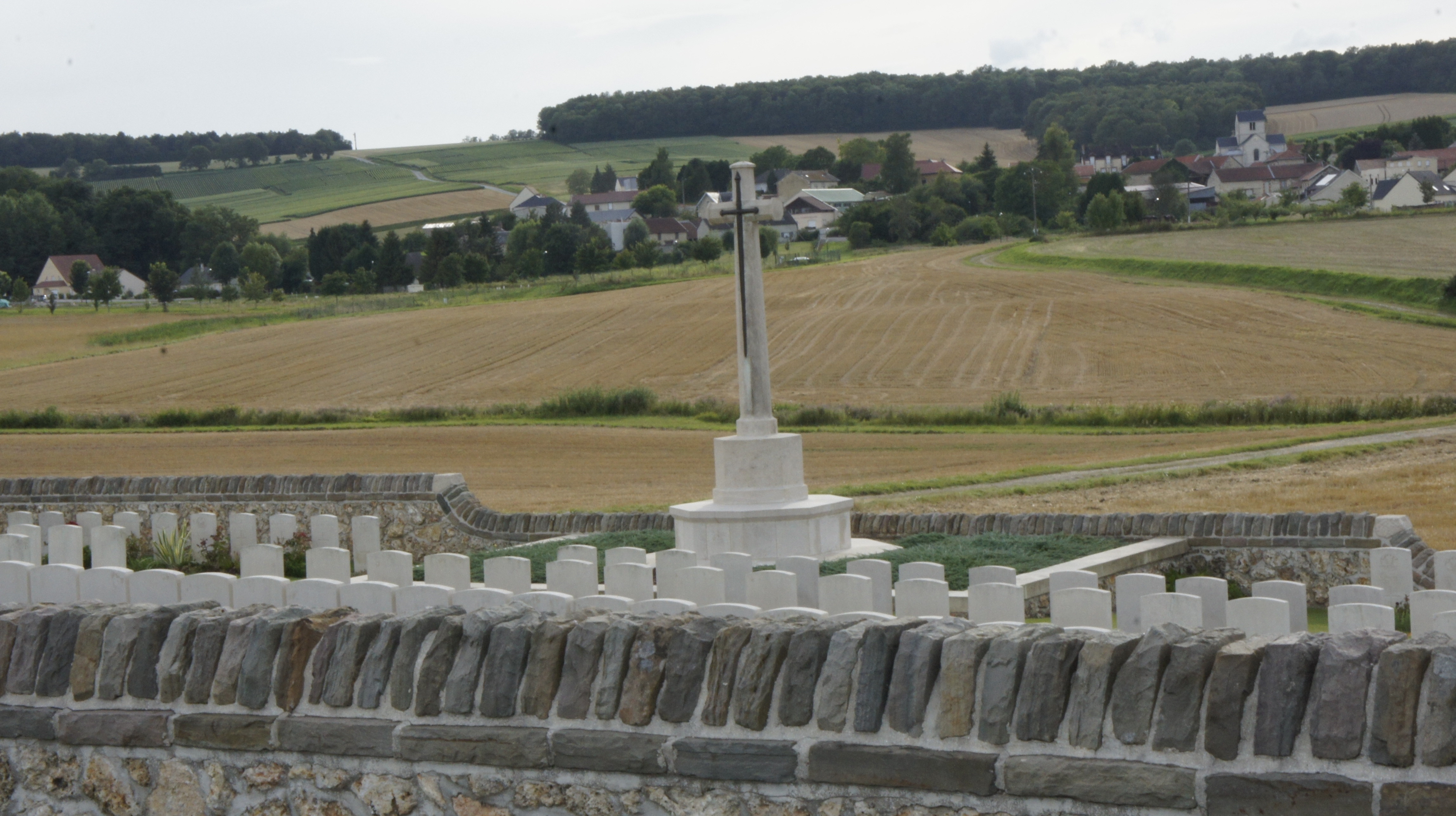 sur la commune de Bouilly le British cemetery.